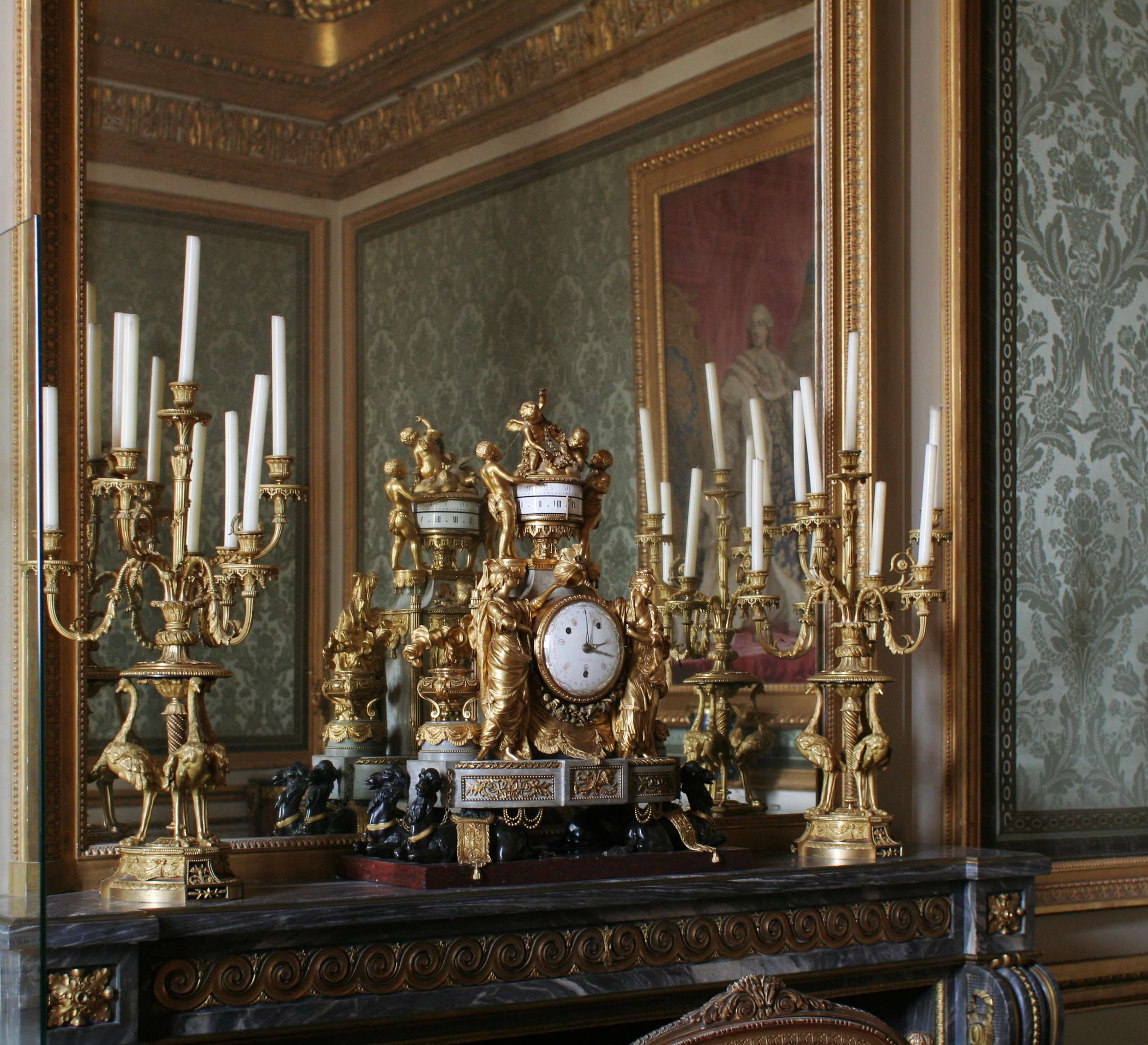 Château de Versailles, salon des nobles, garniture de cheminée (manteau en marbre bleu turquin avec des bronzes ciselés par Gouthière sur un modèle de Rousseau) : grande pendule « aux chameaux » (bronze ciselé et doré par François Rémond, marbre blanc et griotte rouge), par Jarossay, horloger du frère du roi, candélabres « aux grues », par François Rémond.